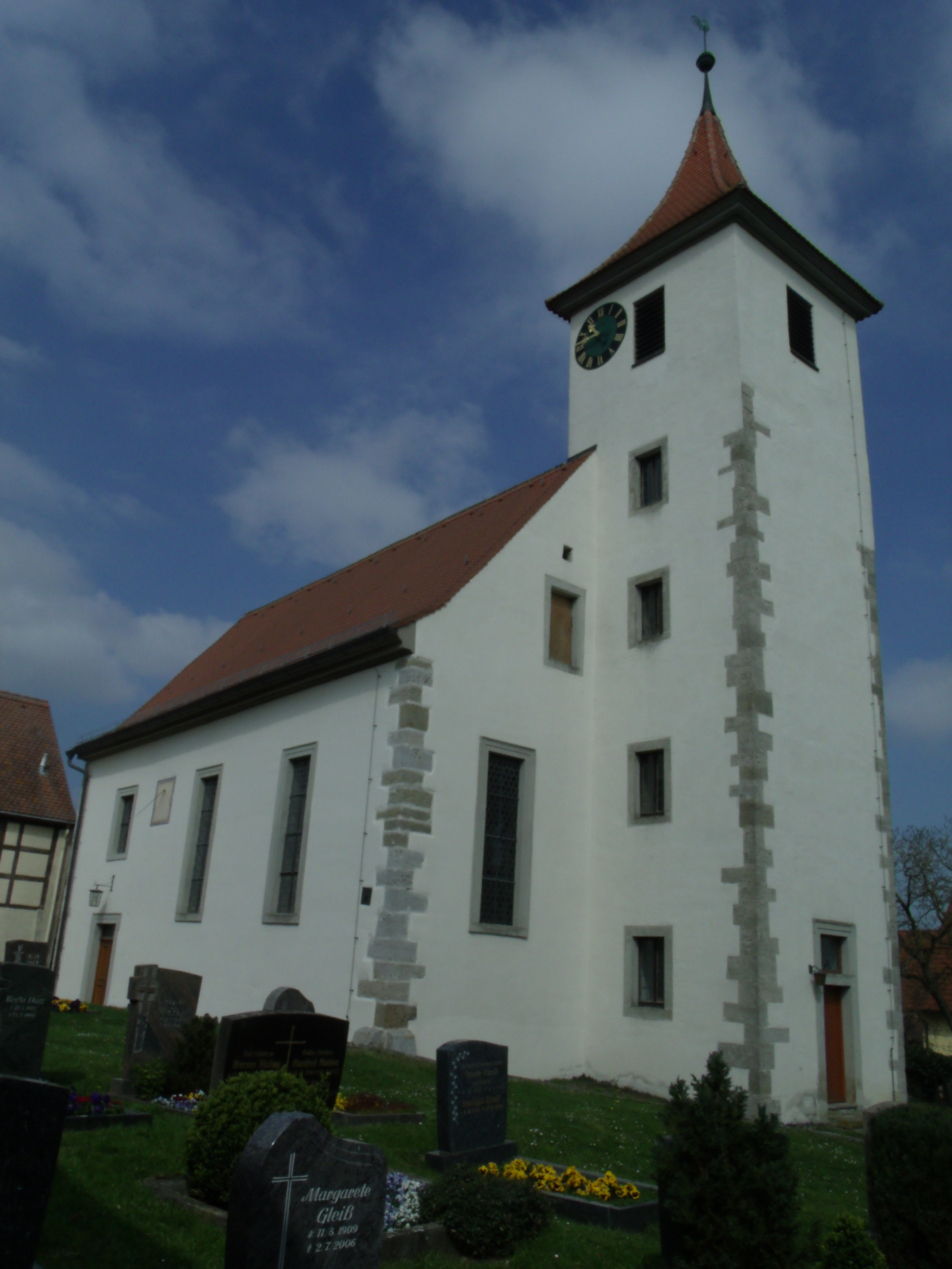 Adelshofen im Landkreis Ansbach, Evang.-luth. Pfarrkirche St. Nikolaus, Süd-Ost-Seite